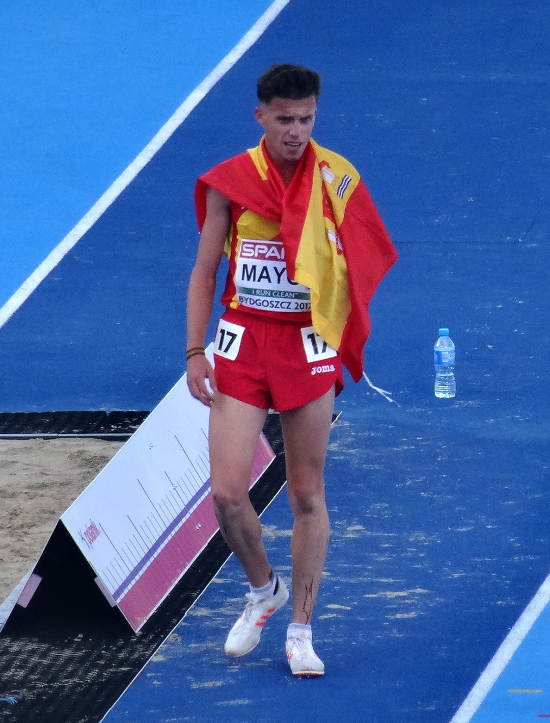 Młodzieżowe Mistrzostwa Europy w Lekkoatletyce U23 w Bydgoszczy 13-16 lipca 2017, finał biegu na 10 000 m mężczyzn